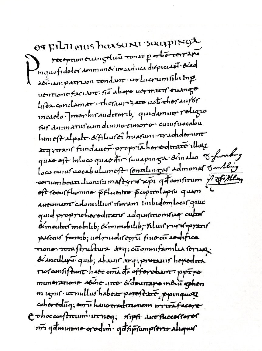 Schenkung von Besitz in Schwabing und Sendling an das Kloster Schäftlarn im Jahre 782. Dieses Dokument gilt als erste namentliche Erwähnung Sendlings. Es ist enthalten auf fol. 171 des Cozroh-Codex (HStA München, HL Freising 3a)